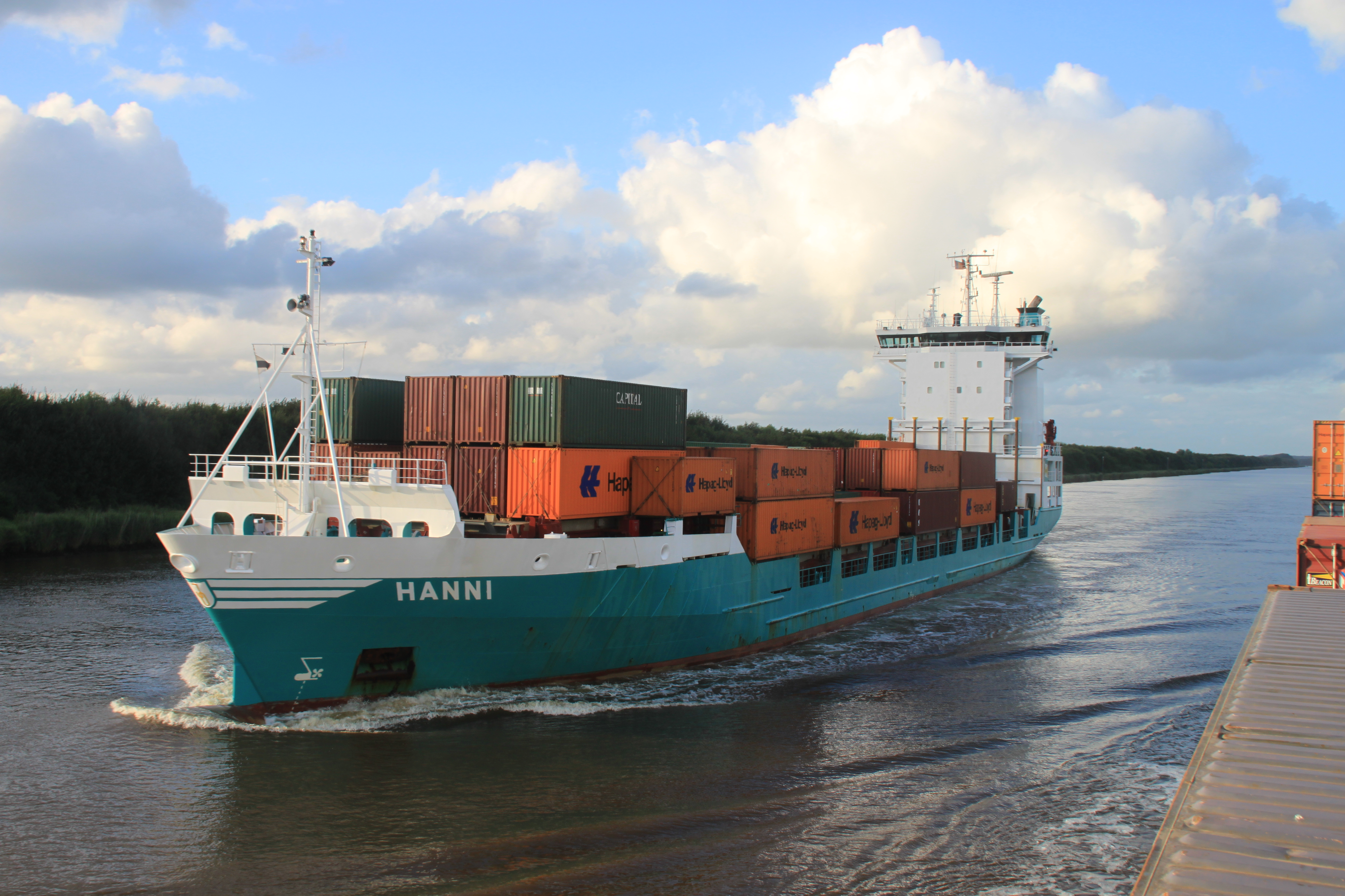 MS HANNI im Nord-Ostsee-Kanal in Weiche Kudensee (fotografiert von Bord der MS DORNBUSCH als Passagier einer Frachtschiffreise)_Schiffsbegegnung